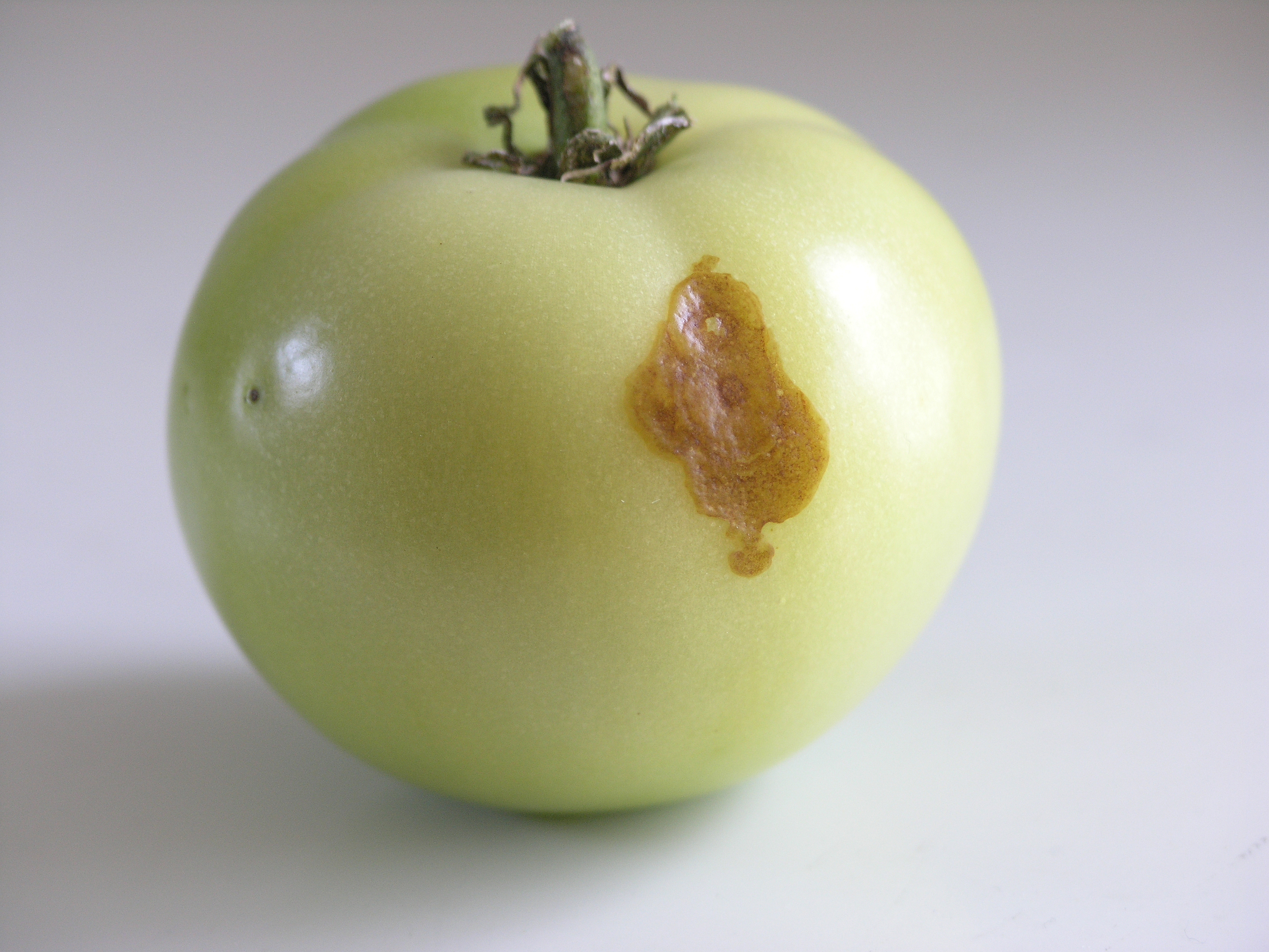 Tomate Frucht mit Karameltränen genetisch verursacht / tomato fruit with caramel tears